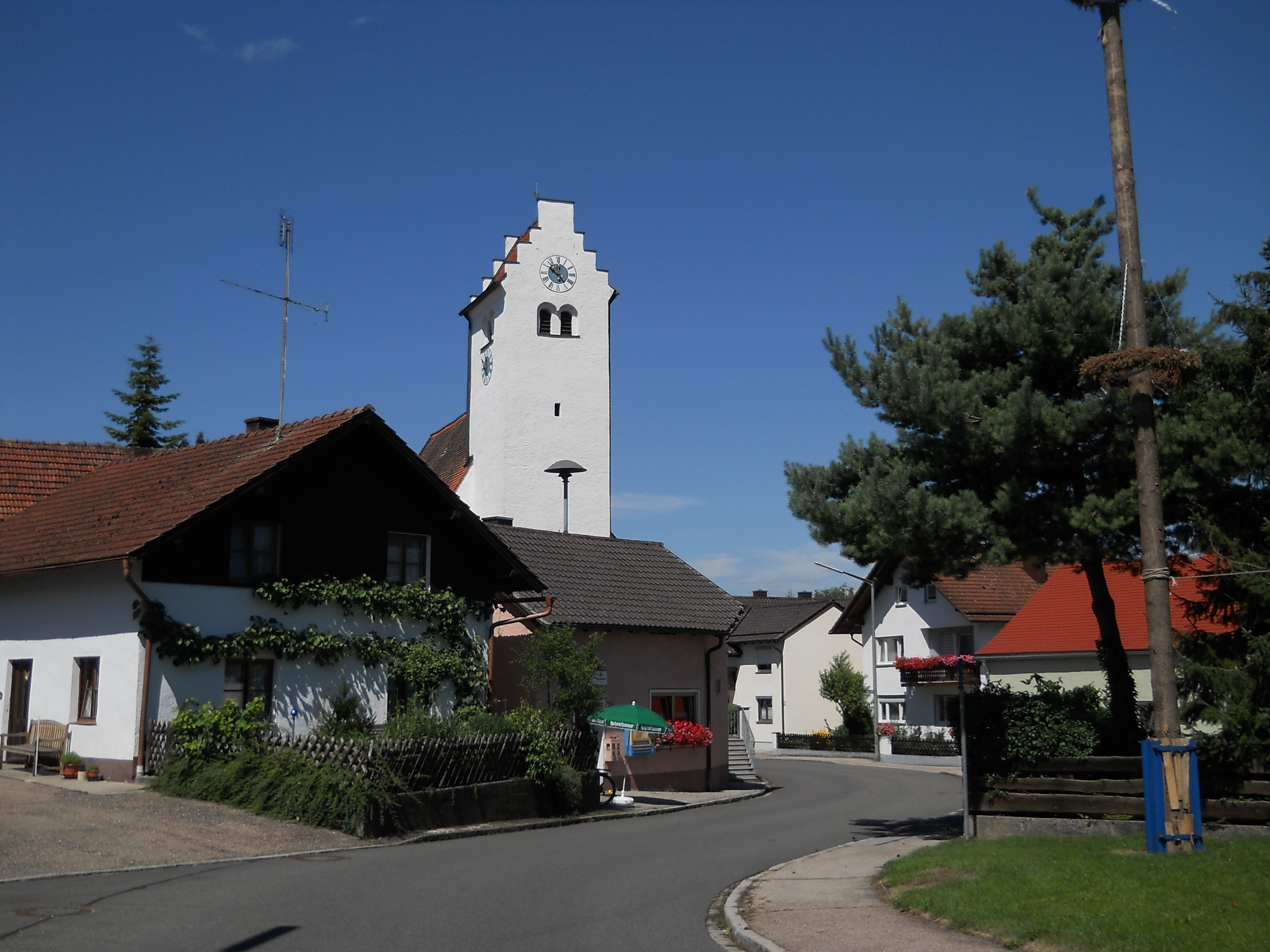 Dunsdorf, Ortsteil der Gemeinde Kipfenberg im Landkreis Eichstätt, Oberbayern, Kirche St. Martin (Kipfenberg) und Dorfgemeinschaftshaus